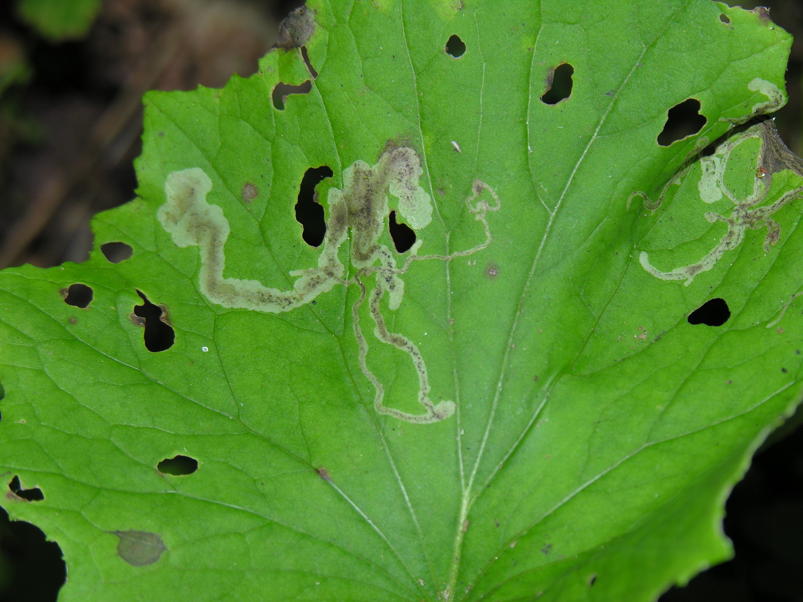 Lapo mina Foto: Algirdas, 2005 m. rugpjūčio 31 d.